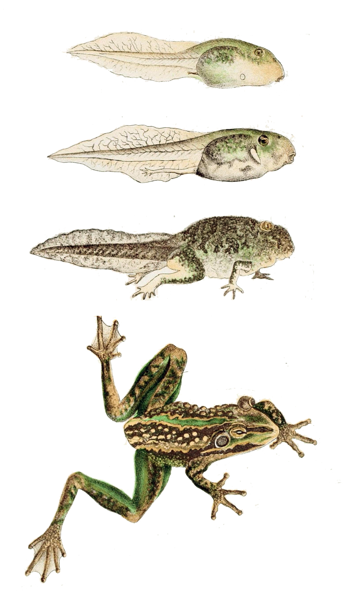 Litoria aurea development